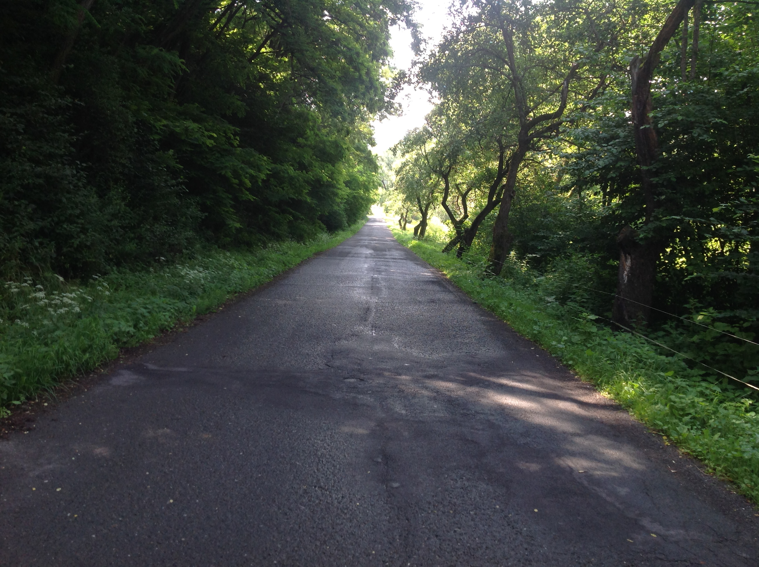 prístupová cesta do dedinky